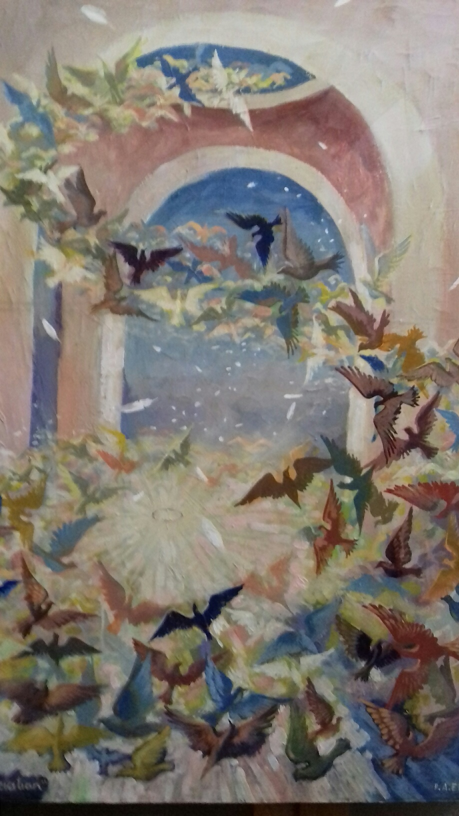 peinture sur toile de 100x80cm